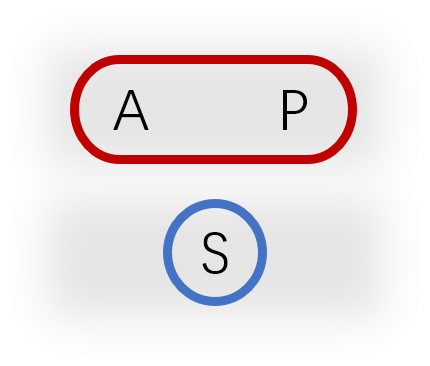 中文（中国大陆）: 句法形态配列，AP-S